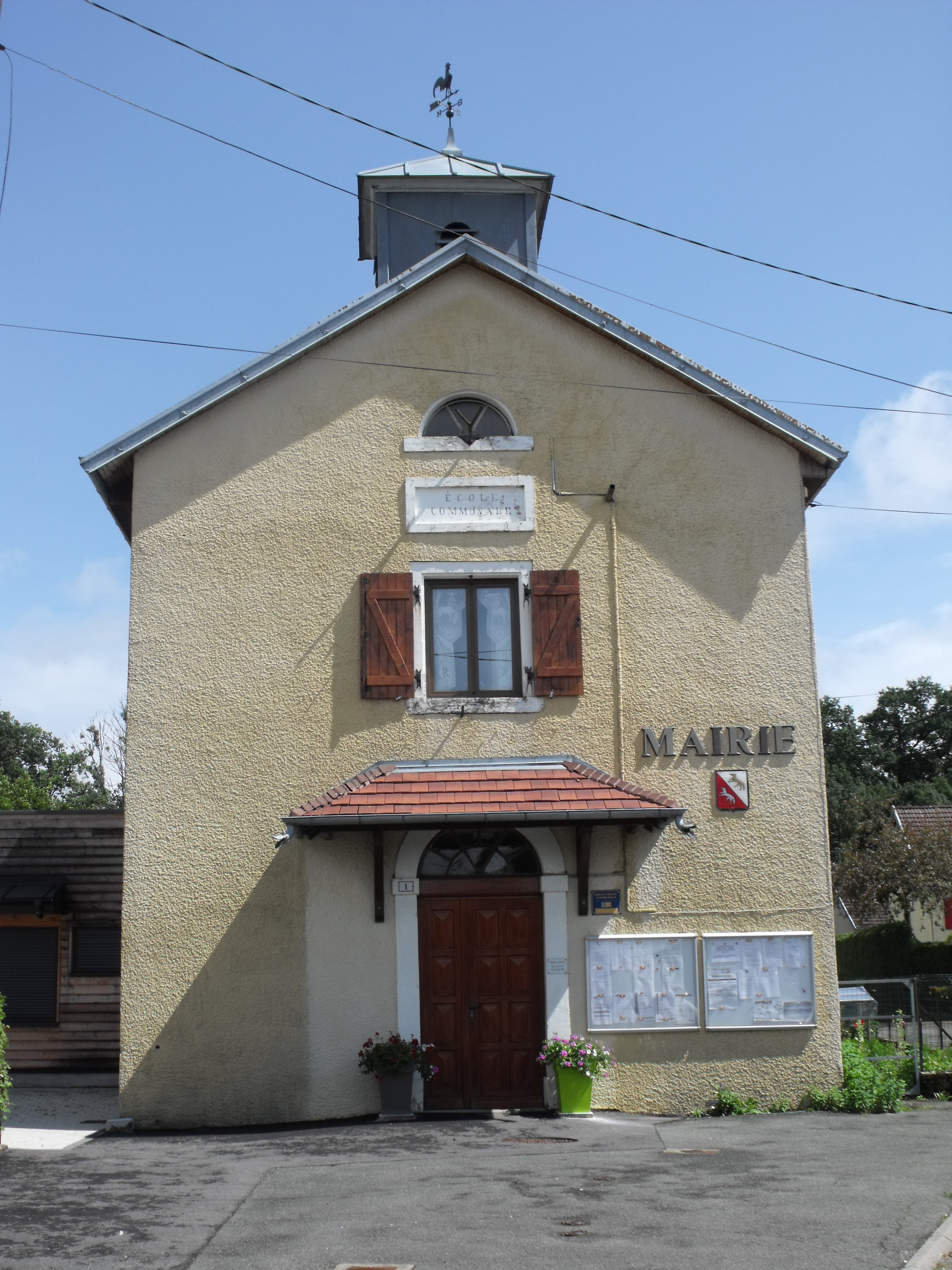 Mairie d'Echenans, Doubs, France